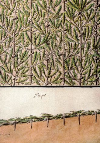 Couverture en branchages fixée au sol pour protéger les semis et d’empêcher l’effet du vent sur la surface des dunes